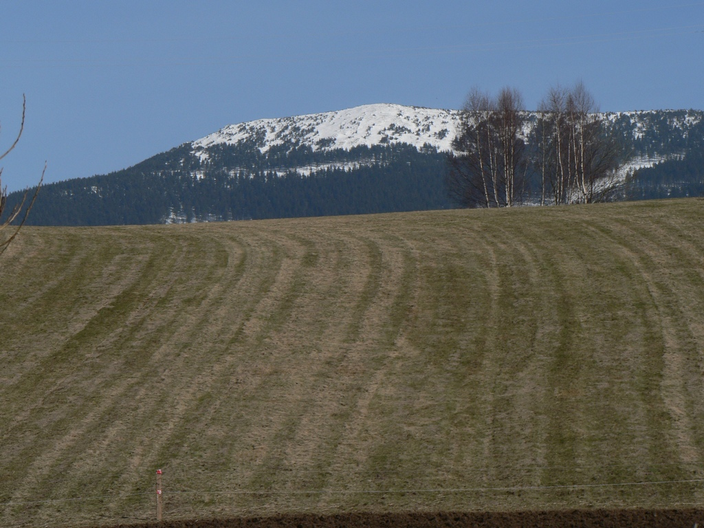 Břidličná v předjaří, pohled z Vernířovic